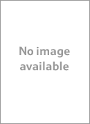 No image available